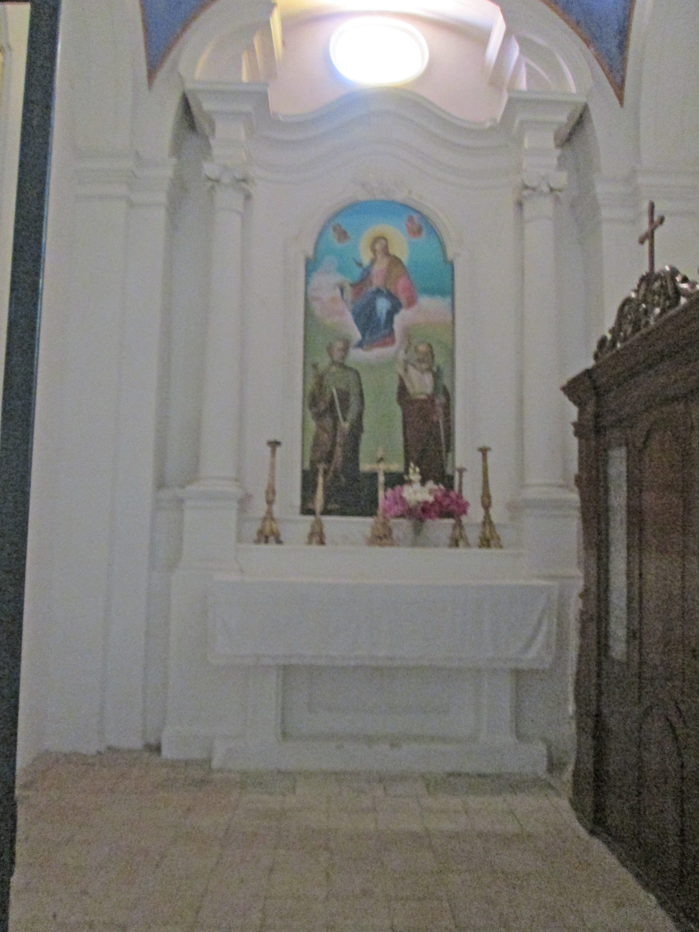 Cappella interna della chiesa della Madonna in Basilica. Villa Santa Maria (CH)